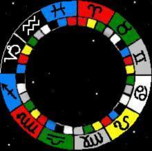 "Zodiaque des Décans Astrologique de Ptolèmée", date de création : 28/01/07, crée par Alexandre N.Isis